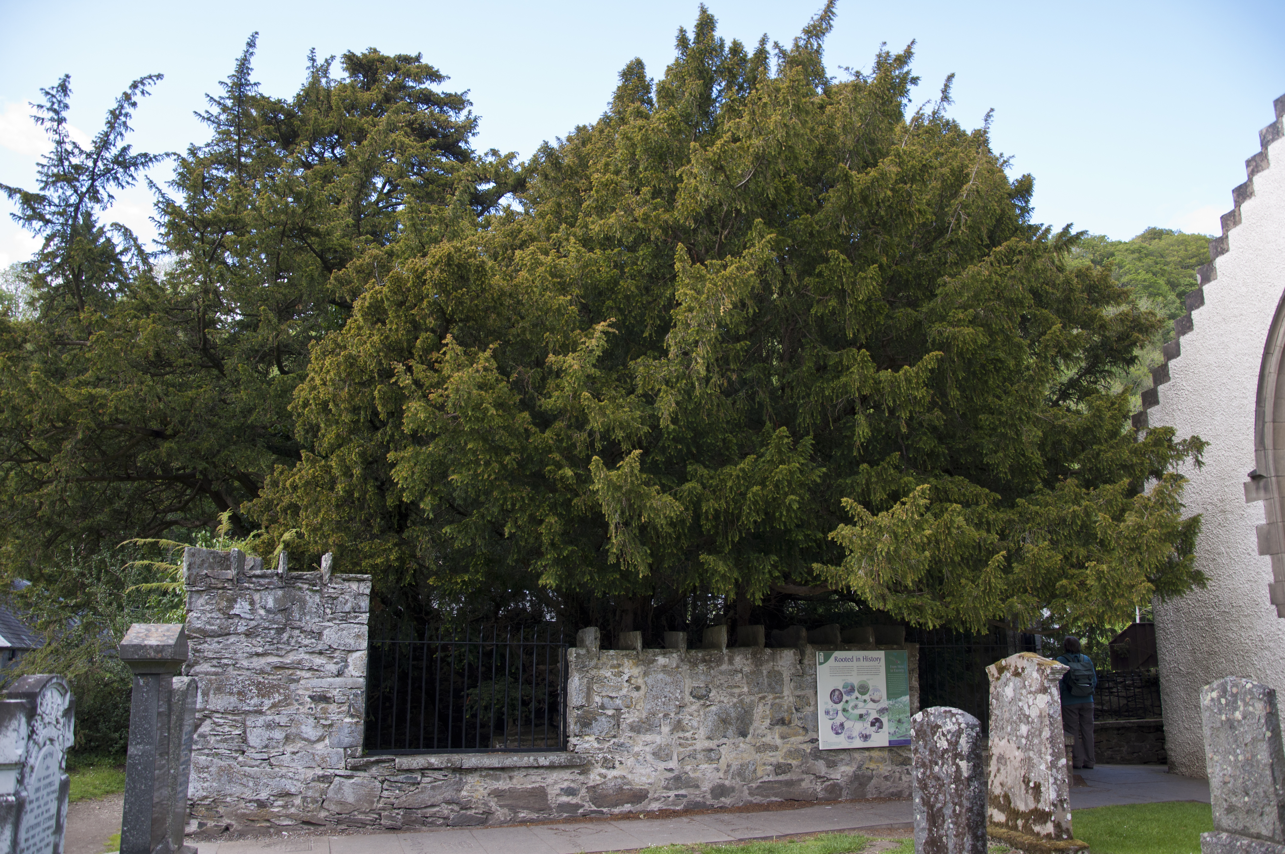 De venijnboom in Fortingall, Schotland